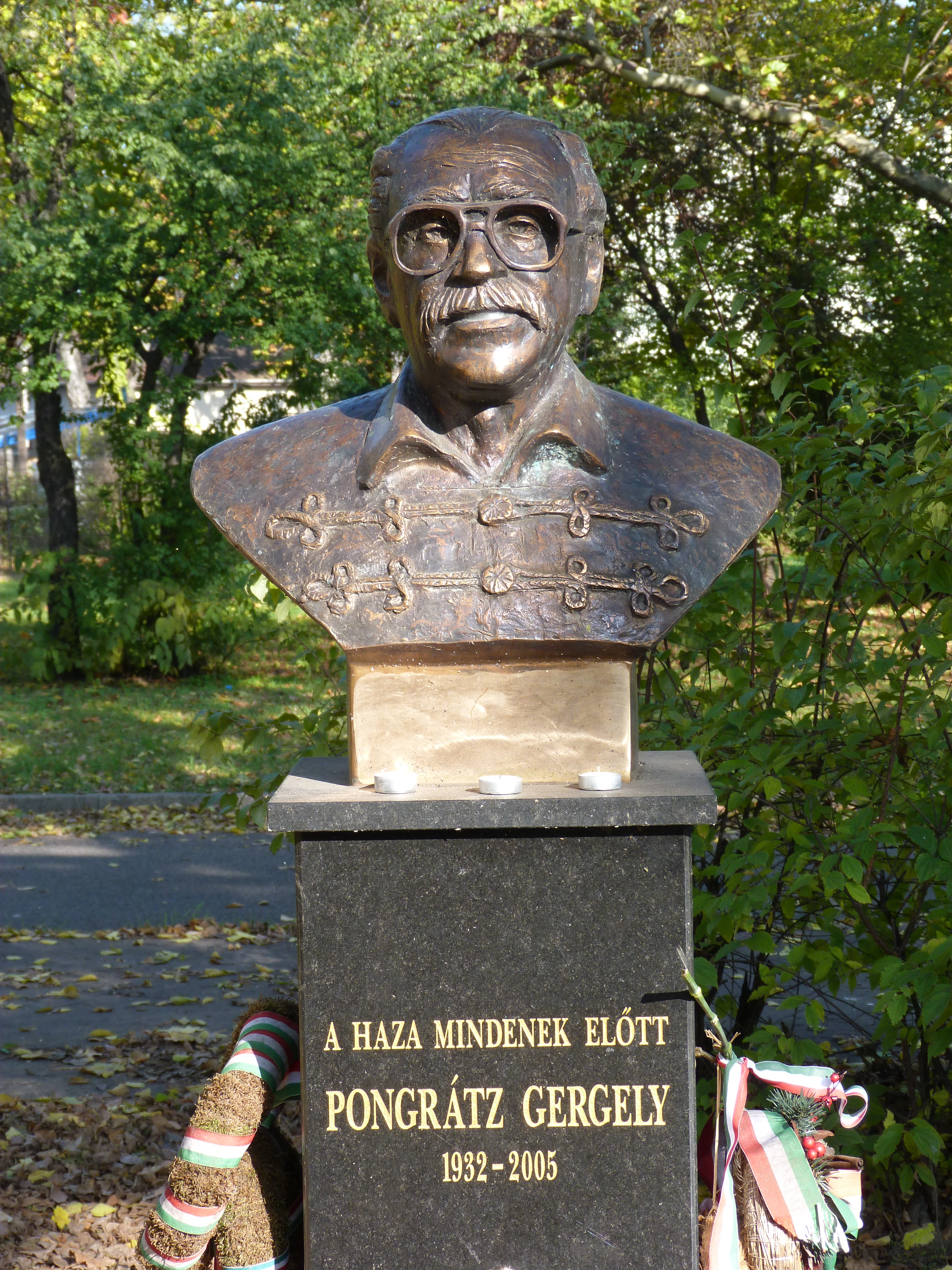 A felvétel 2014. november 5-én készült Budapesten. Pongrátz Gergely mellszobra. ©© Derzsi Elekes Andor, Budapest, 2014, A kép és filmfelvételek egészben, vagy részletekben másolását, bármilyen úton történő sokszorosítását és felhasználását a szerző ellenérték nélkül, jogutódjaira is kihatóan megengedi. Az engedély kiterjed a kereskedelmi célú hasznosításra is. Kéri azonban nevének feltüntetését a felhasználás során. A Metapolisz sorozat valamennyi képe és filmje Creative Commons alatti valamint kereskedelmi - for profit - célra is felhasználható. Ajánlott hivatkozás: Derzsi Elekes Andor: Metapolisz DVD line